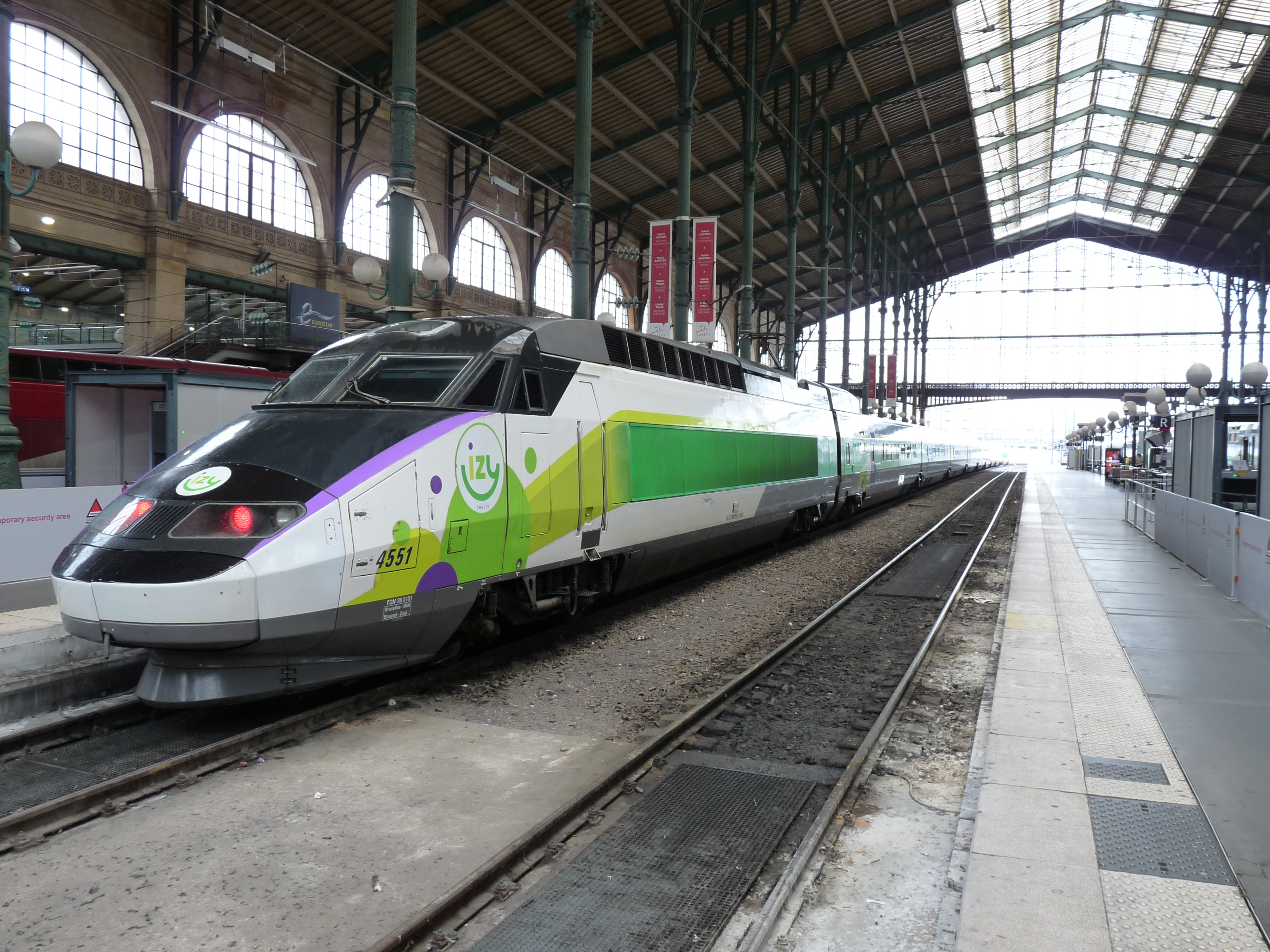 Izy trein in Paris Nord